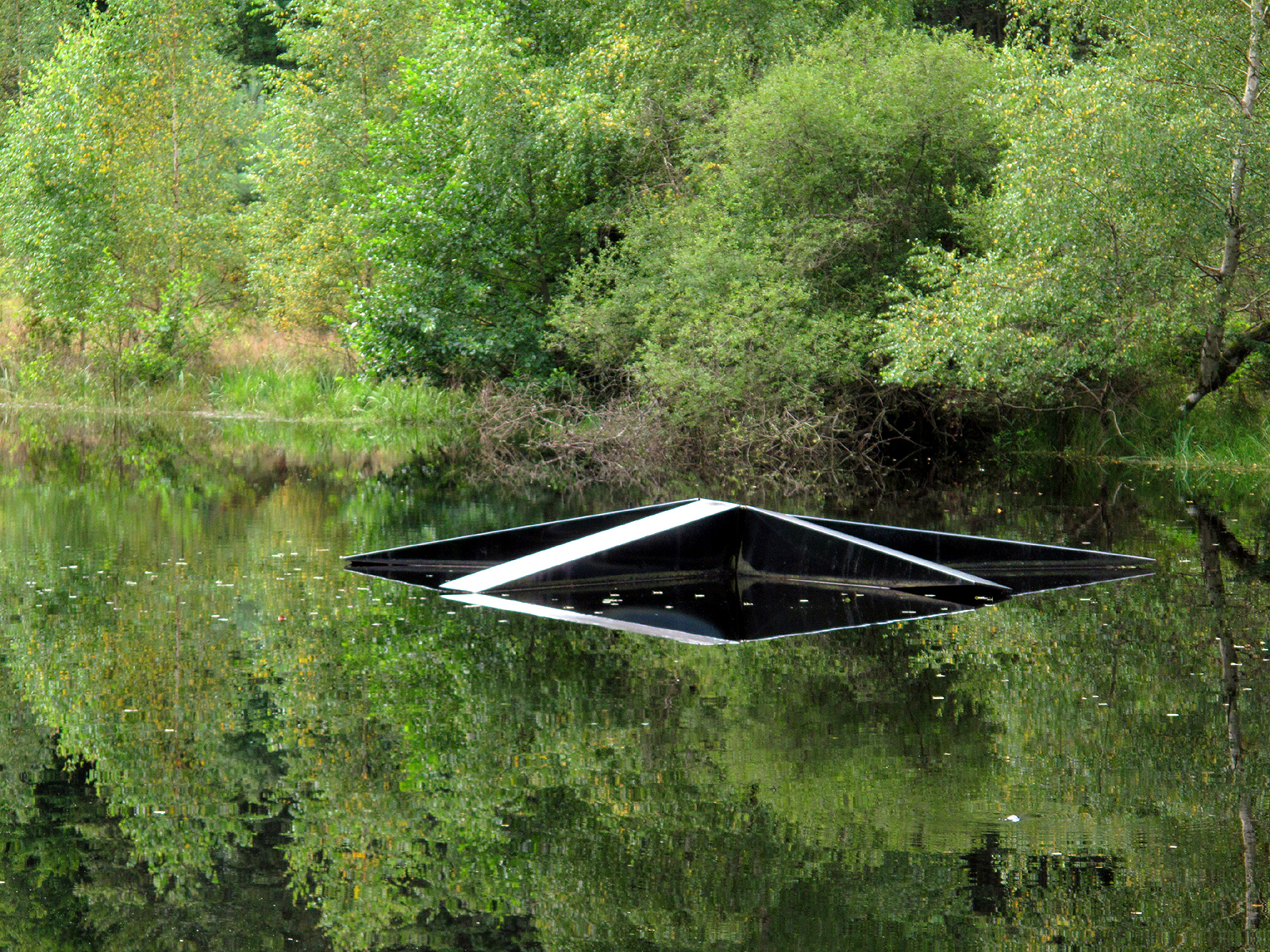 Doris Halfmann, Königin der Nacht, 1992, - Deutschland, Rheinland-Pfalz, Skulpturenweg Karlstal